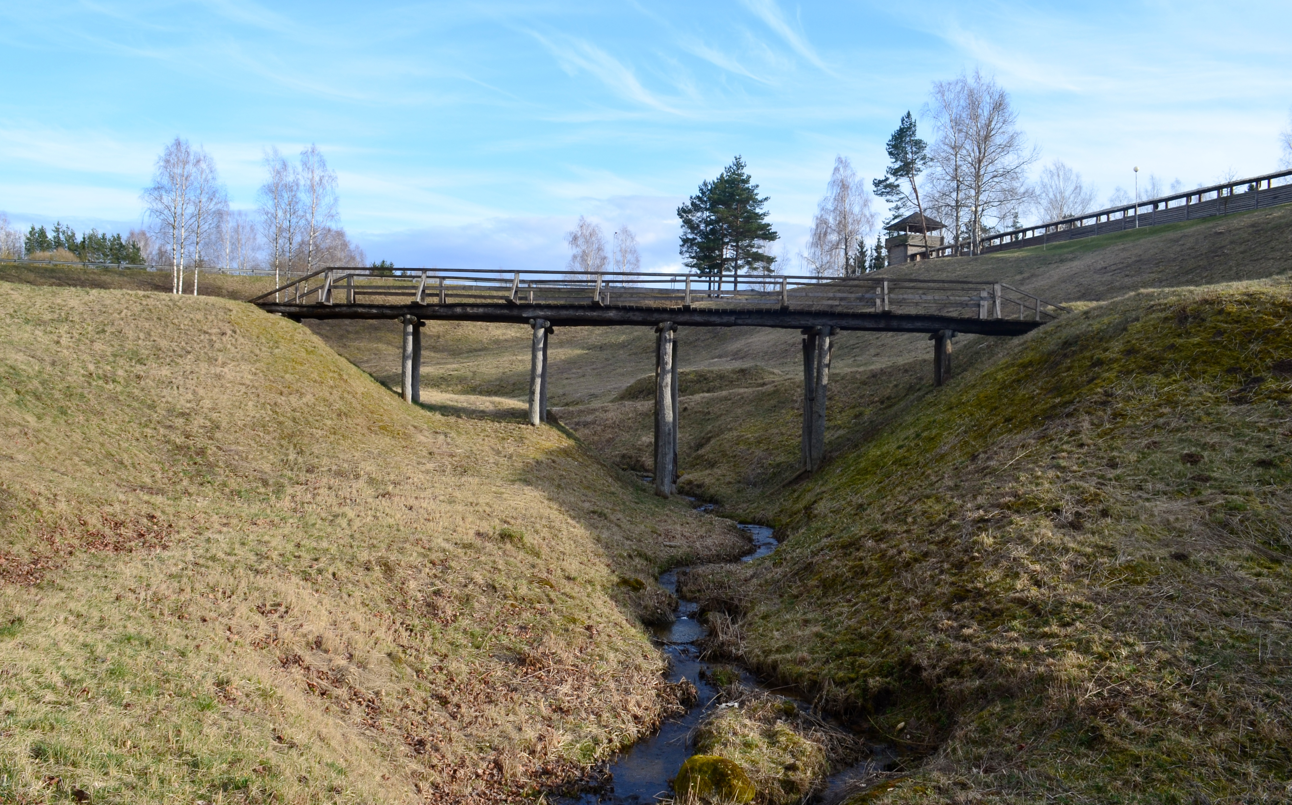 Tiltas per Valupį prie Šeimyniškėlių piliakalnio, Anykščių raj.